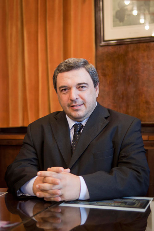 Presidente del Banco Central del Uruguay